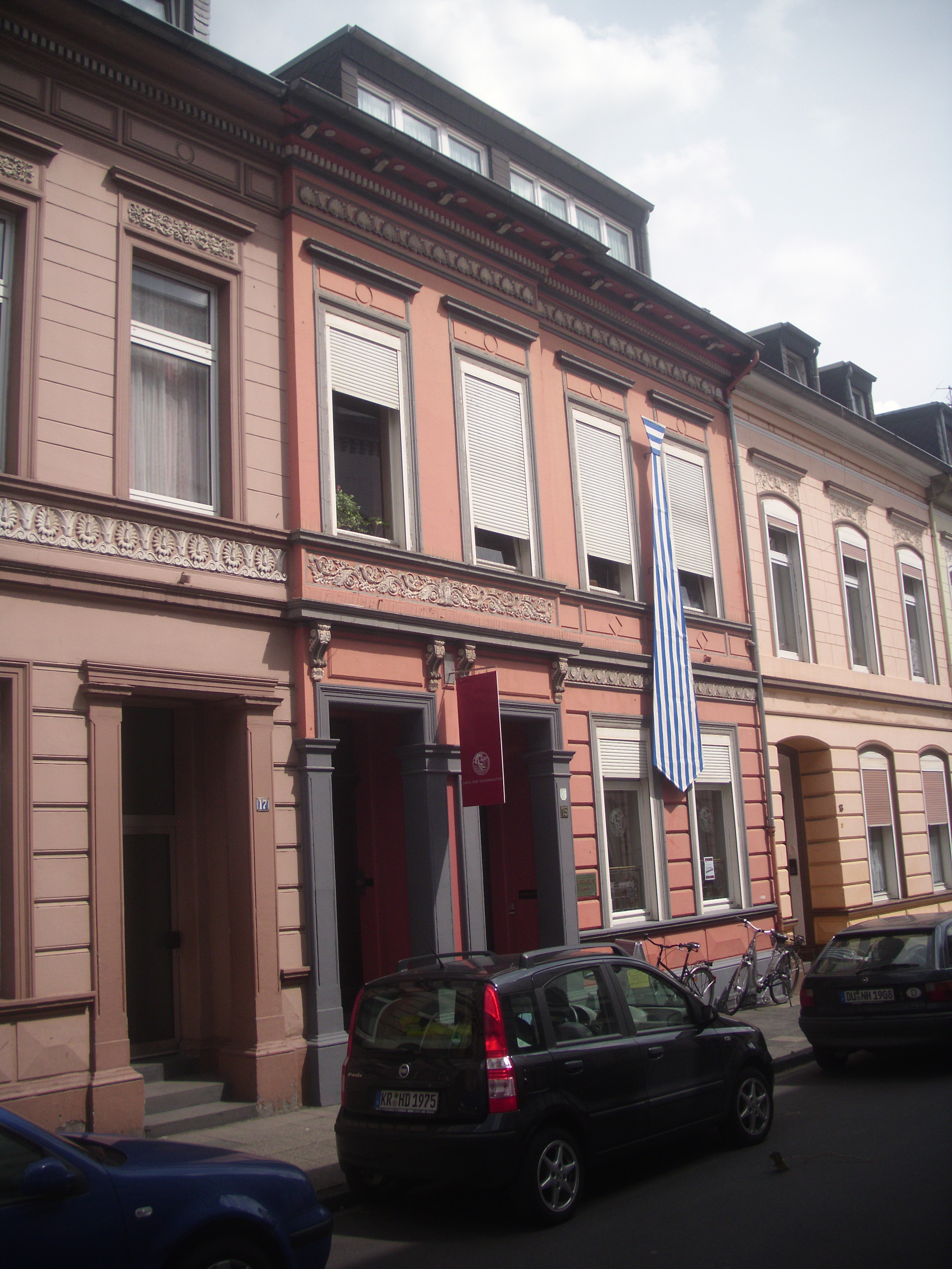 Krefeld: Haus der Seidenkultur im Juli 2011This is a photograph of an architectural monument.